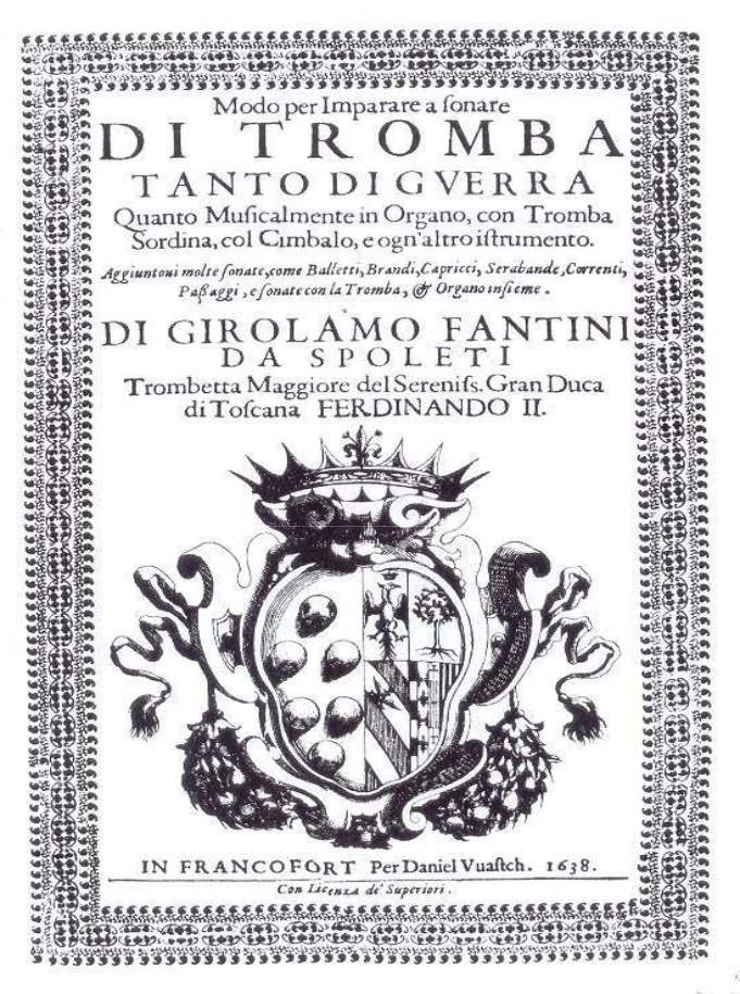 Frontispice de la méthode de Girolamo Fantini (1600–1675), Modo per imparare a sonare di Tromba (publiée à Francfort en 1638).